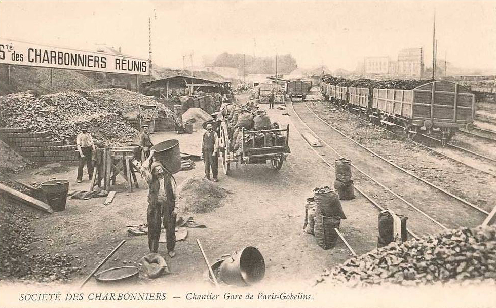 Gare de Paris-Gobelins (13e) - Petite Ceinture ferroviaire